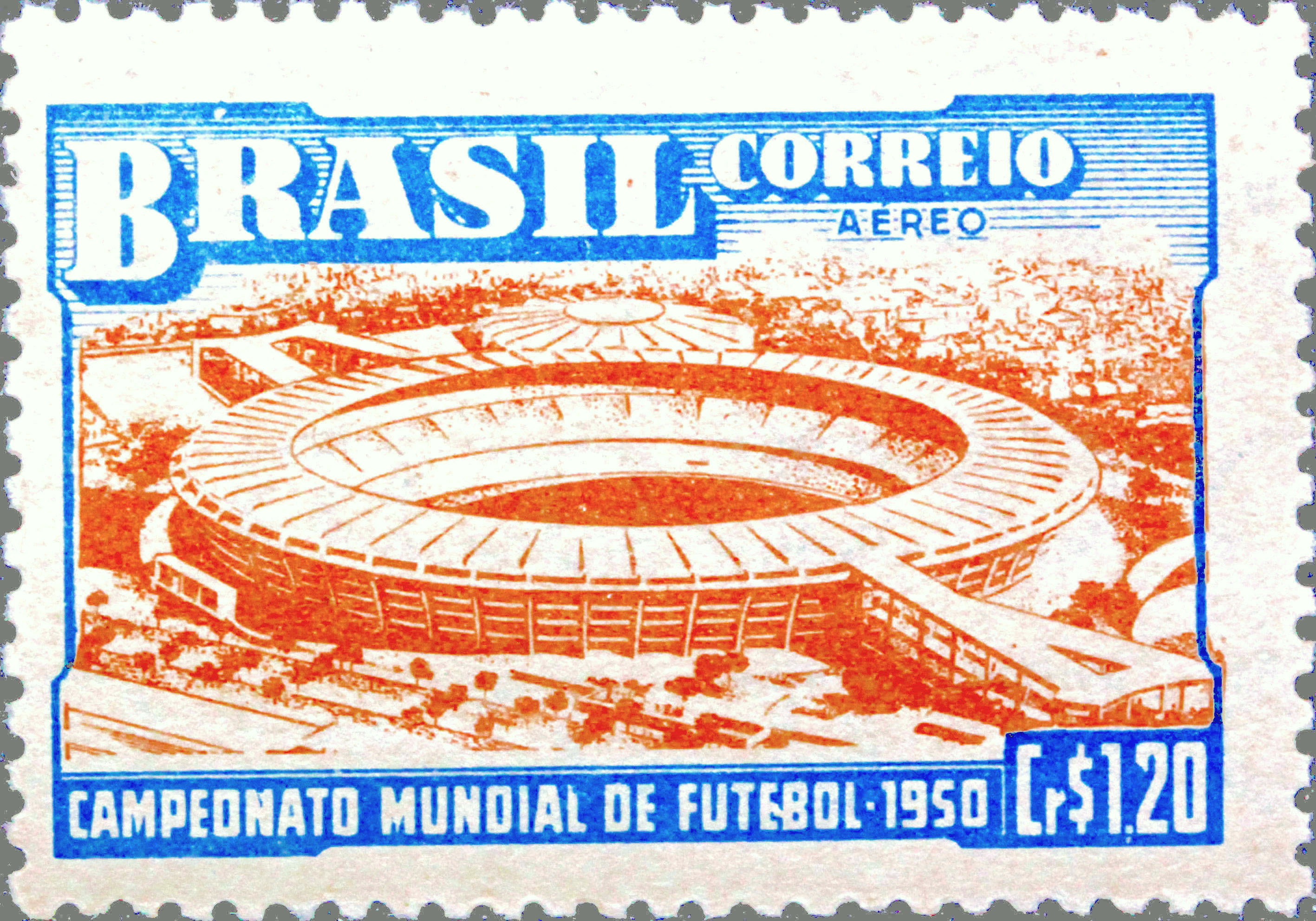 Selo Comemorativo do Campeonato Mundial de Futebol de 1950 (Copa do Mundo de 50).